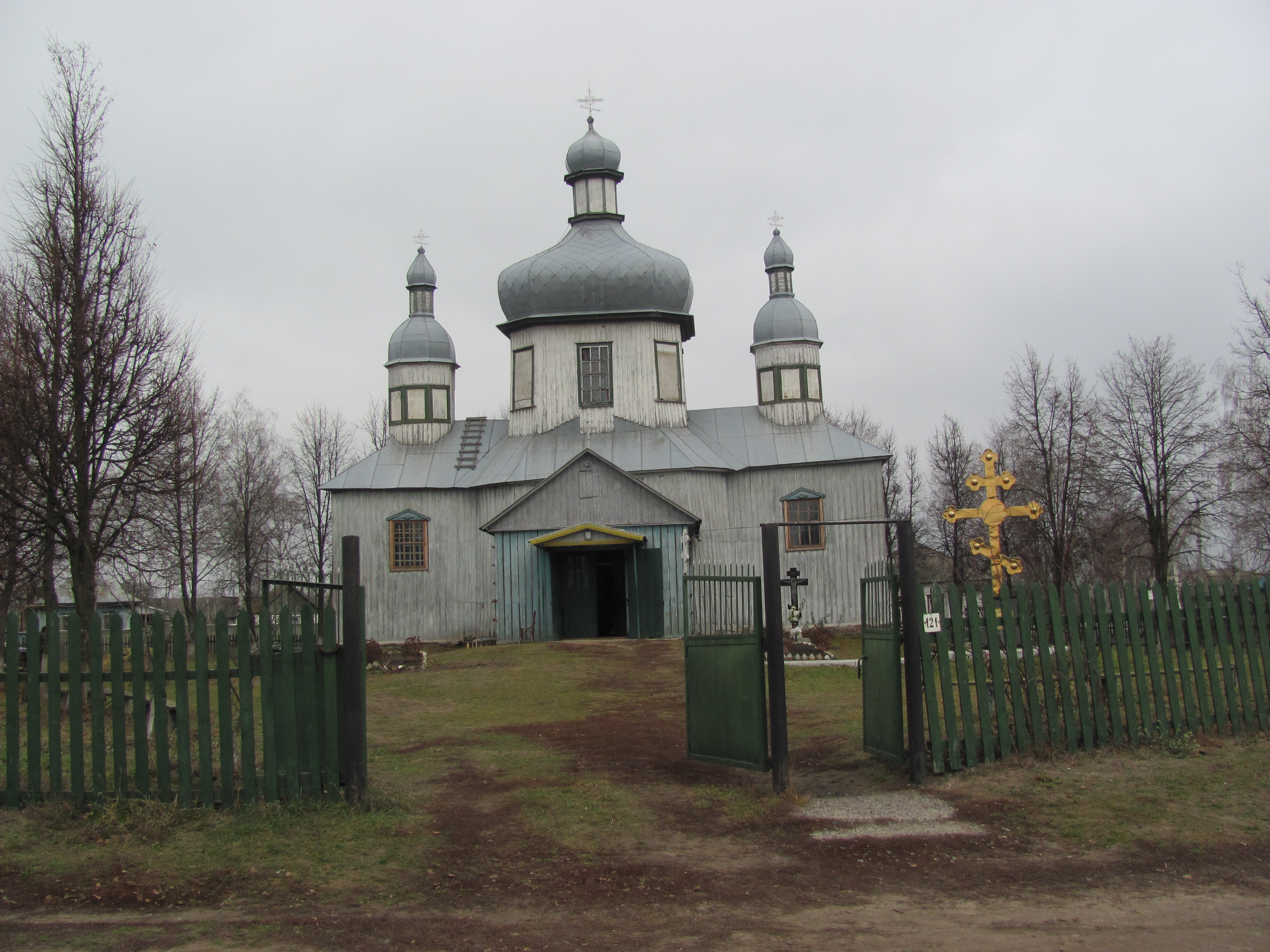 Фото церкви